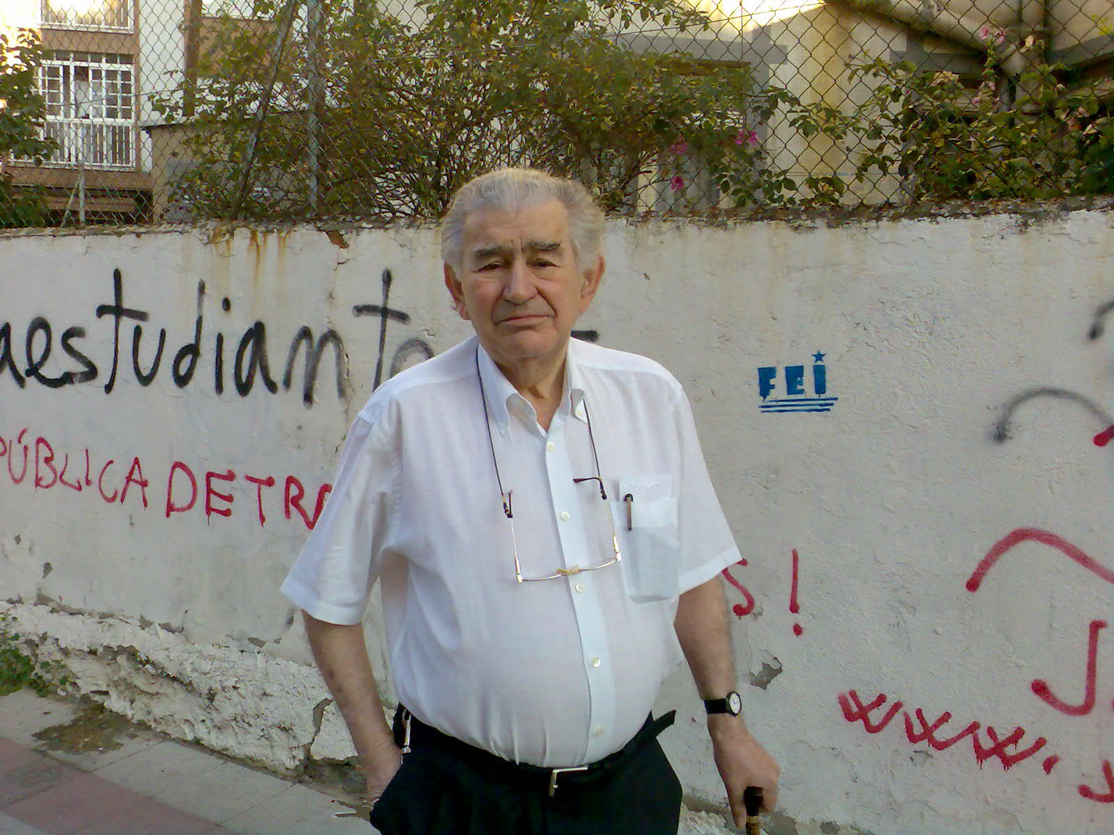 Antonio Gamoneda en León, agosto de 2007